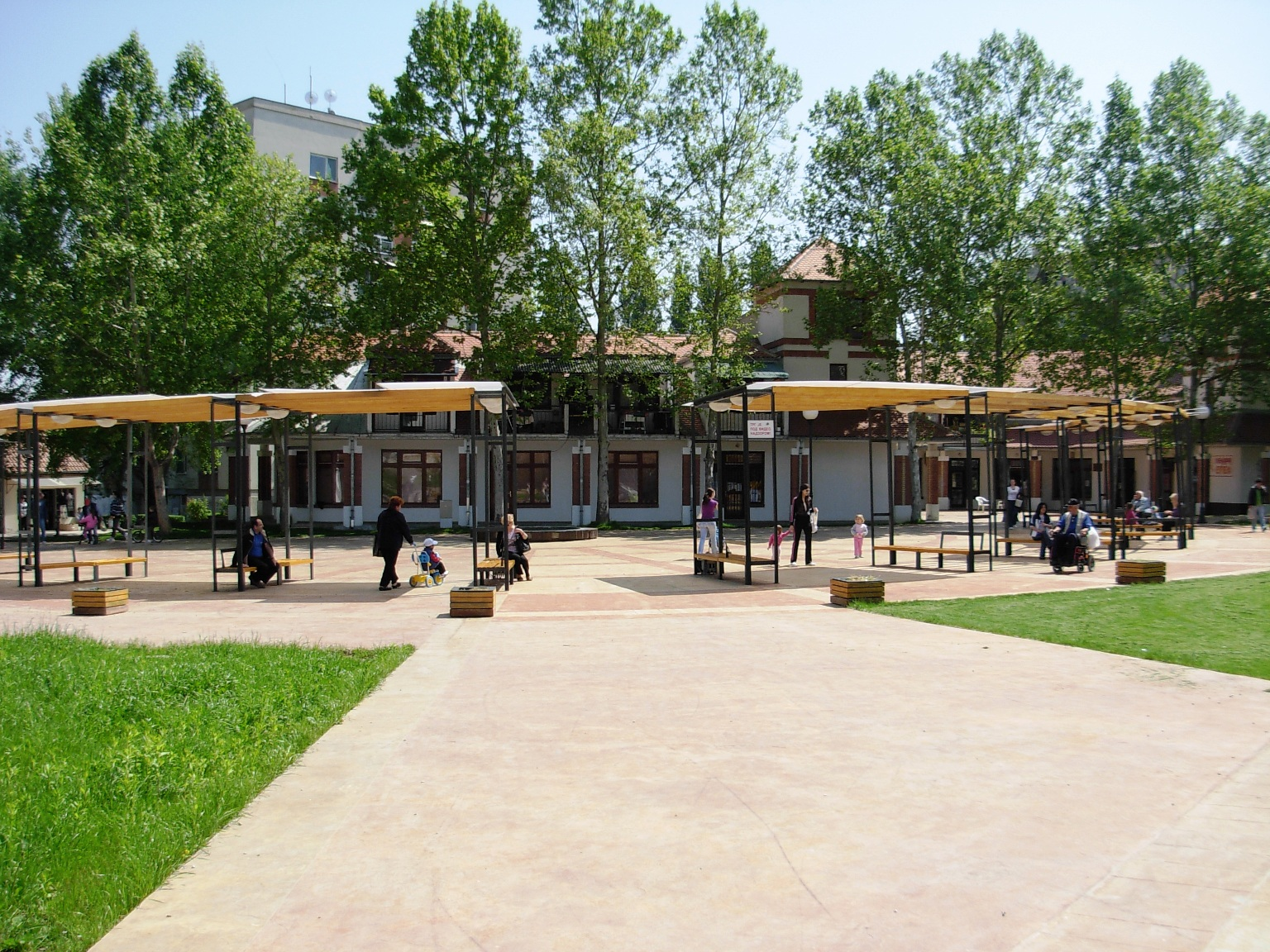 Trg Cara Lazara u Beočinu.